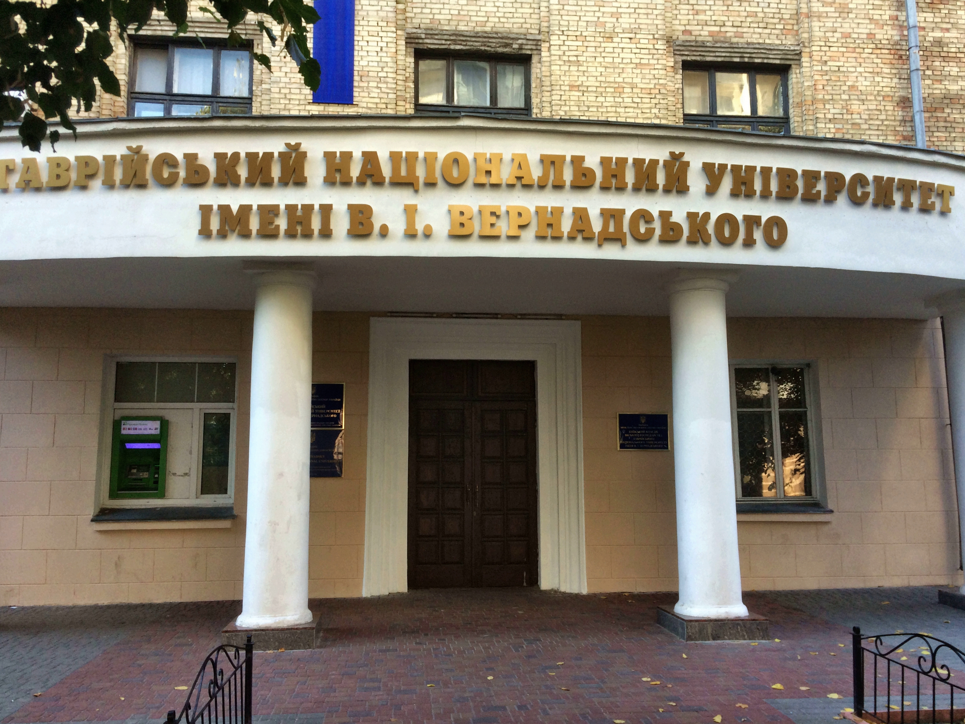 ТНУ в Киеве